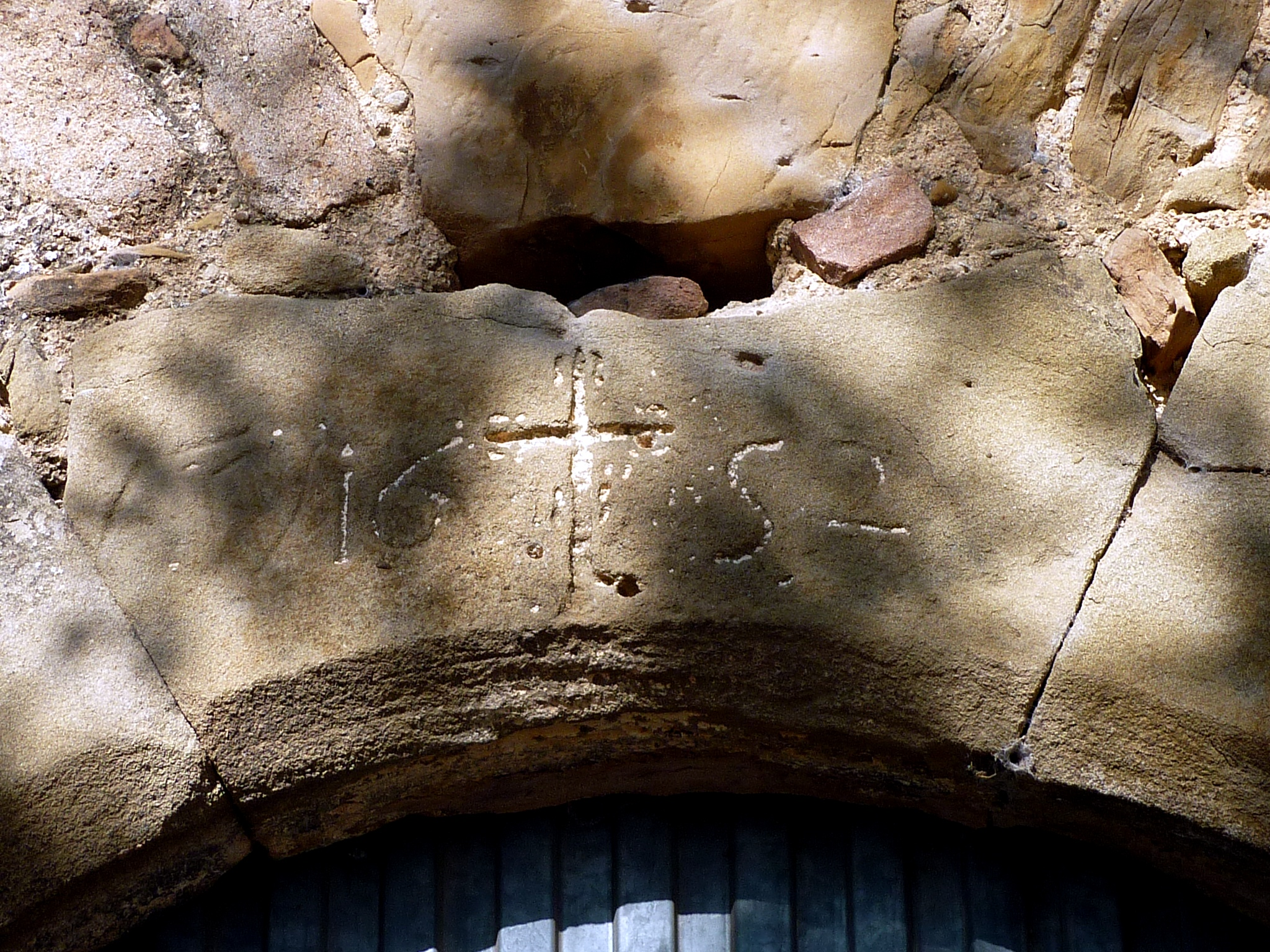 Casa Trilla de Pallargues del Palau de Rialb: inscripció a la clau de volta de la portalada (la Baronia de Rialb)